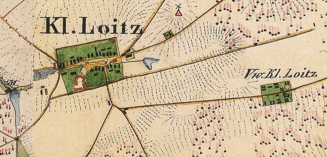 Klein Loitz, Ortsteil der Gem. Felixsee, Landkreis Spree-Neiße, Brandenburg, Ausschnitte aus den Urmesstischblättern 4352 Sellessen und 4353 Döbern von 1845, kombiniert